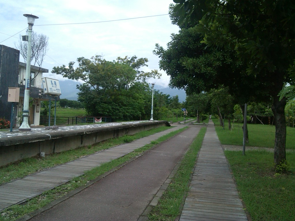 已荒廢的臺灣鐵路管理局馬蘭車站。